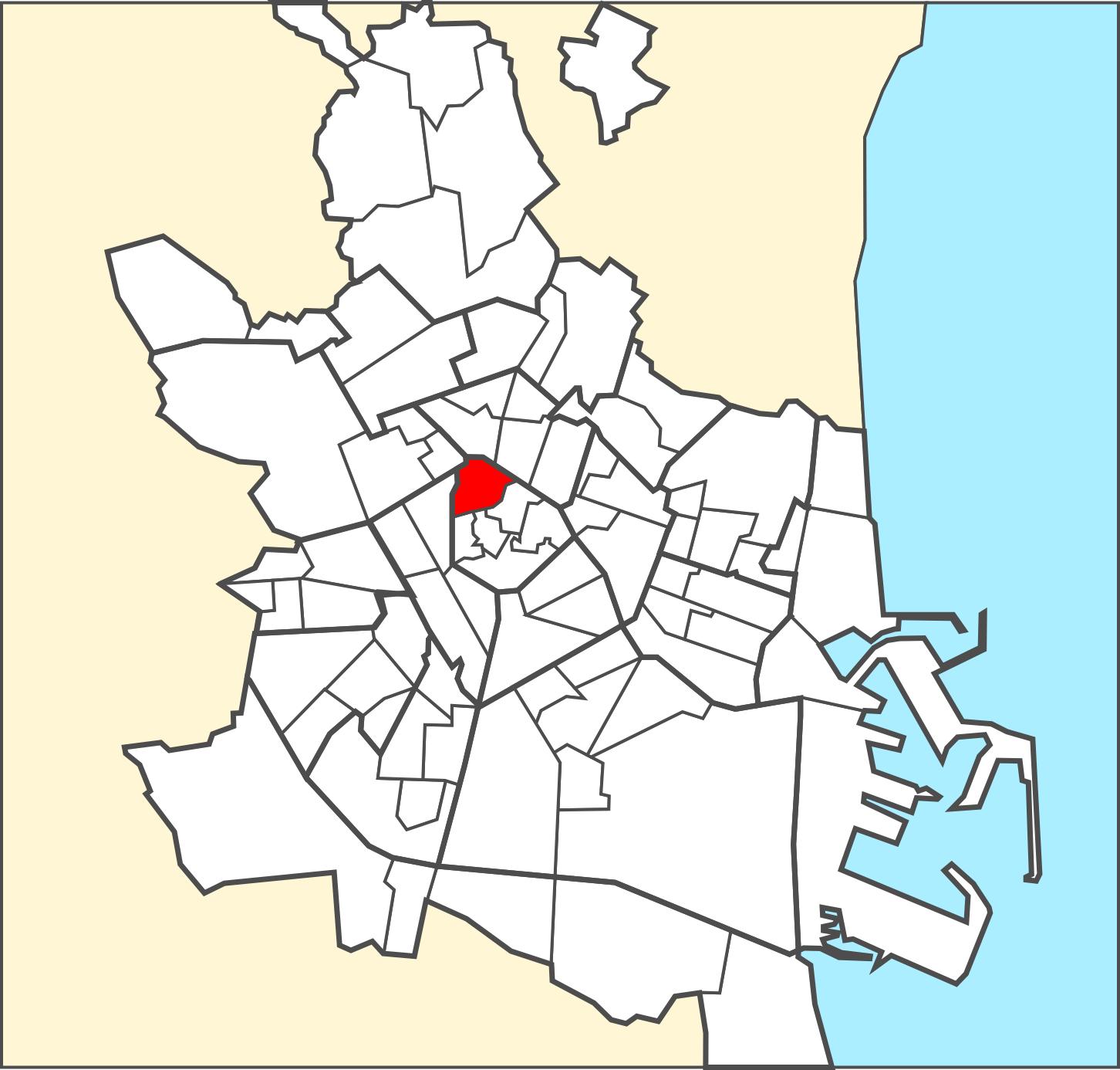 Localització del barri dins de la ciutat de València.